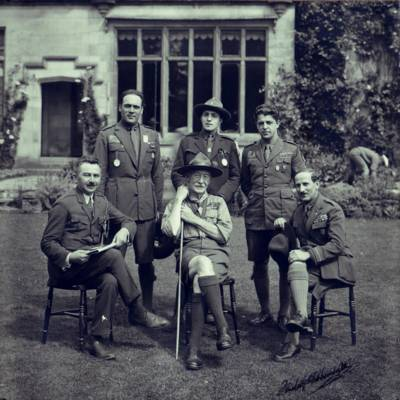 membri delegatiei Romaniei (lt.col. Ulisse Samboteanu, Constantin Nedelcu, cpt. I. Dimancescu, Alexandru Daia, A.S. Goia) impreuna cu lord Baden-Powell la a treia jamboree internationala, Birkenhead, Marea Britanie, 1929